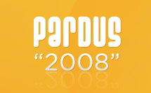 Logo von "Pardus 2008"